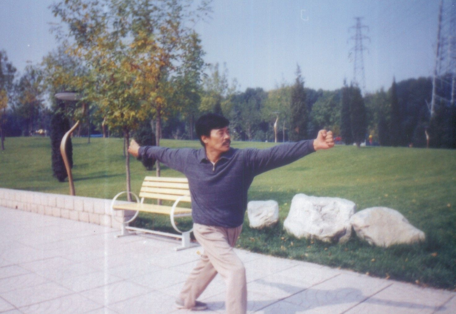 posture